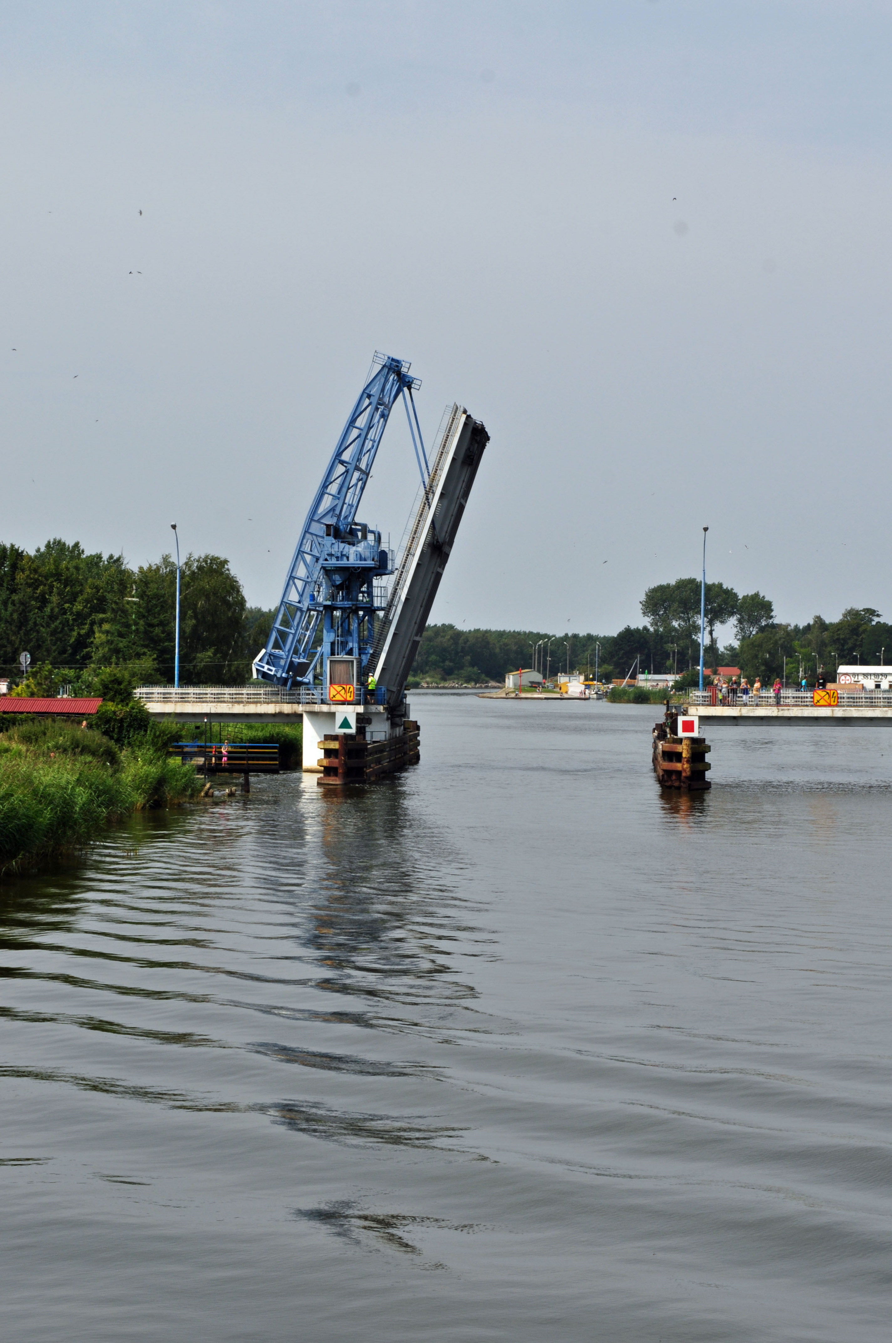 Dziwnów (Powiat Kamieński), c (2011-08-05) by Klugschnacker in Wikipedia Dziwnów Bridge